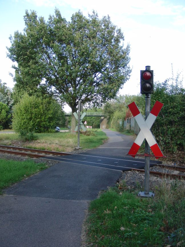 Bahnübergang über die Bahnstrecke von Düren nach Distelrath des parallel zur Merzenicher Straße verlaufenden Radweges